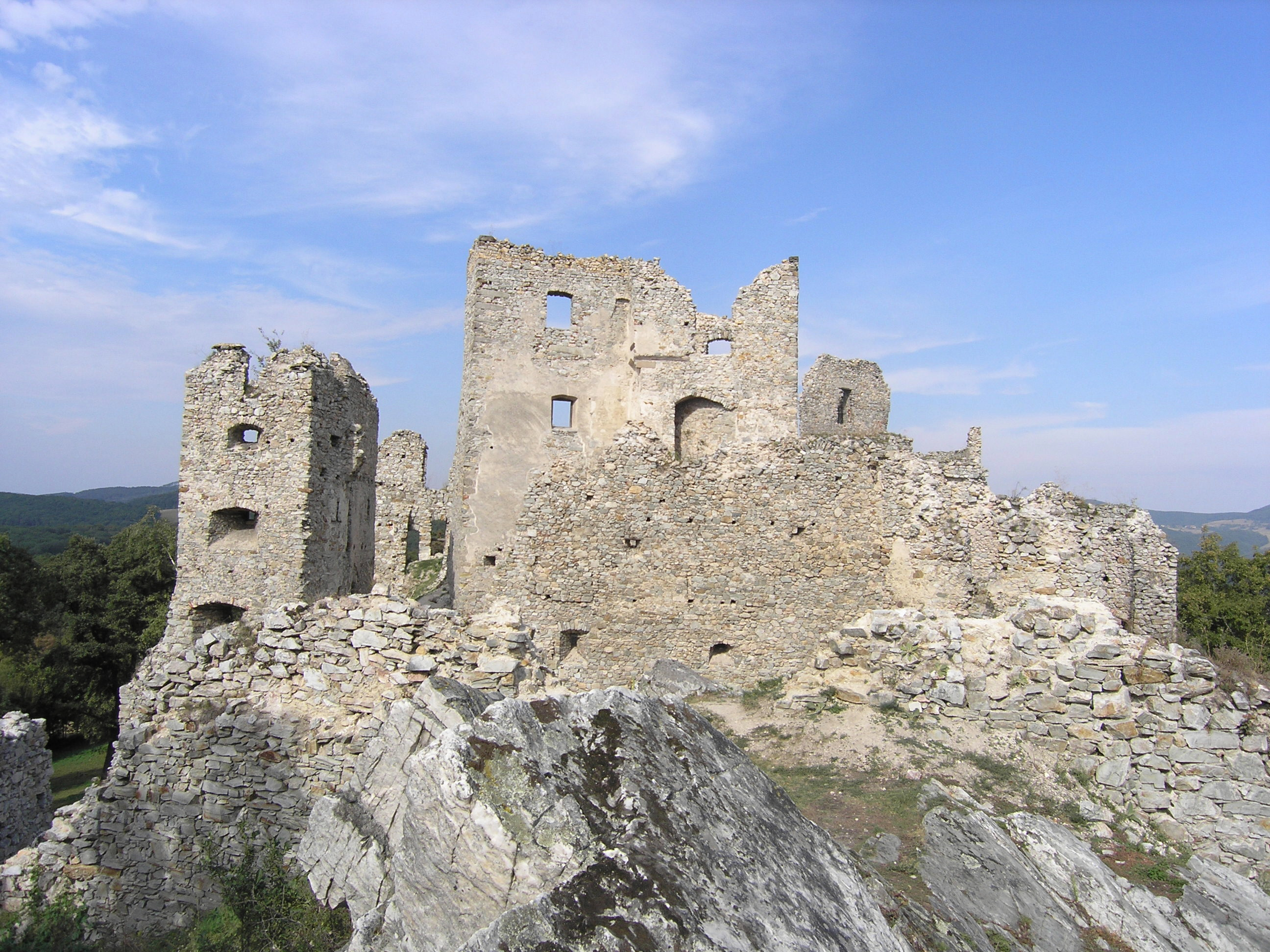 Hrušov - současný stav hradu This medium shows the protected monument with the number 407-1539/1 in the Slovak Republic.